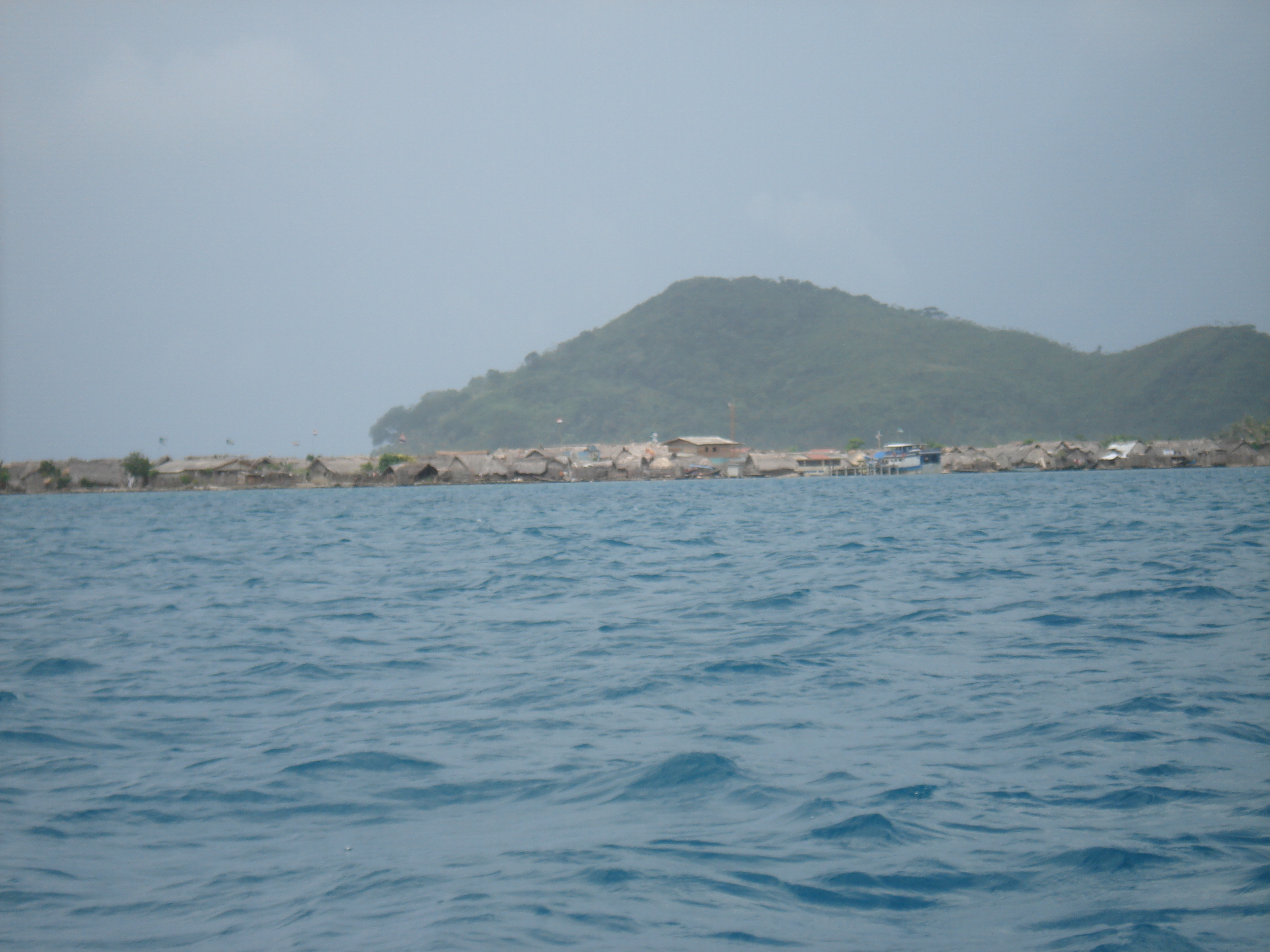 Entre Mulatupo Sasardi y Yansipdiwar (=Carreto), en el Corregimiento de Dubwala.